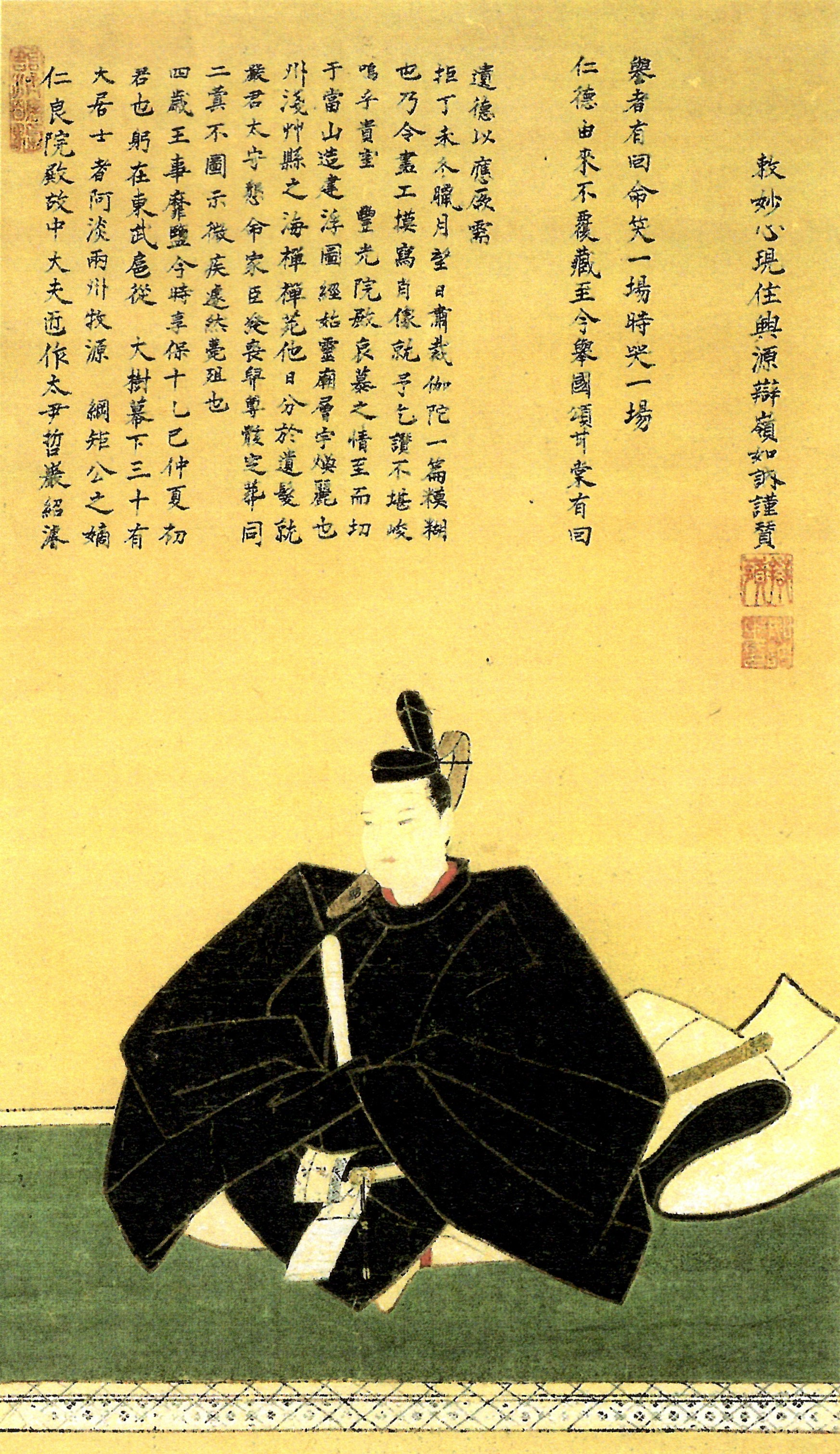 蜂須賀吉武(5代藩主蜂須賀綱矩の次男)の肖像。